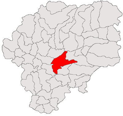 Categorie:Hărţi ale judeţului Bistriţa-Năsăud